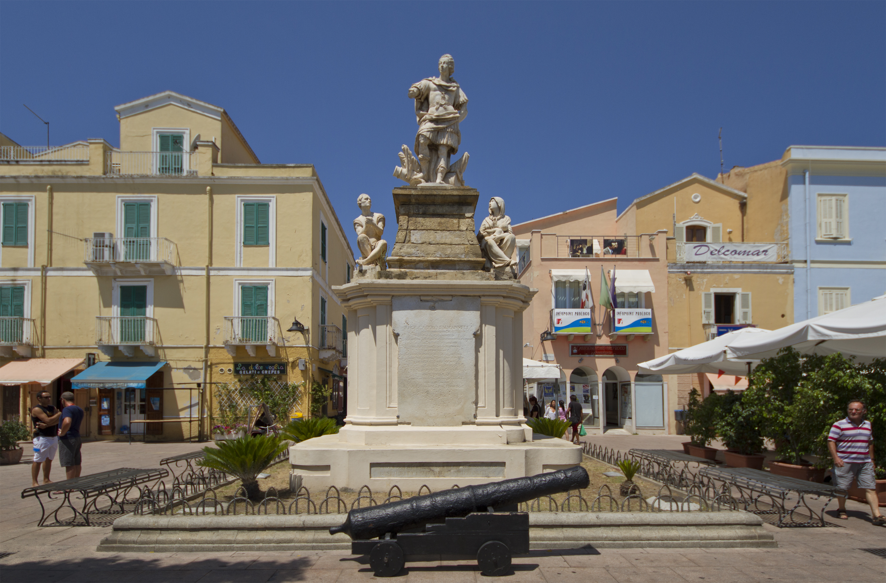 Carlo Emanuele III, Carloforte, Isola di San Pietro, Carbonia-Iglesias, Sardinia, Italy